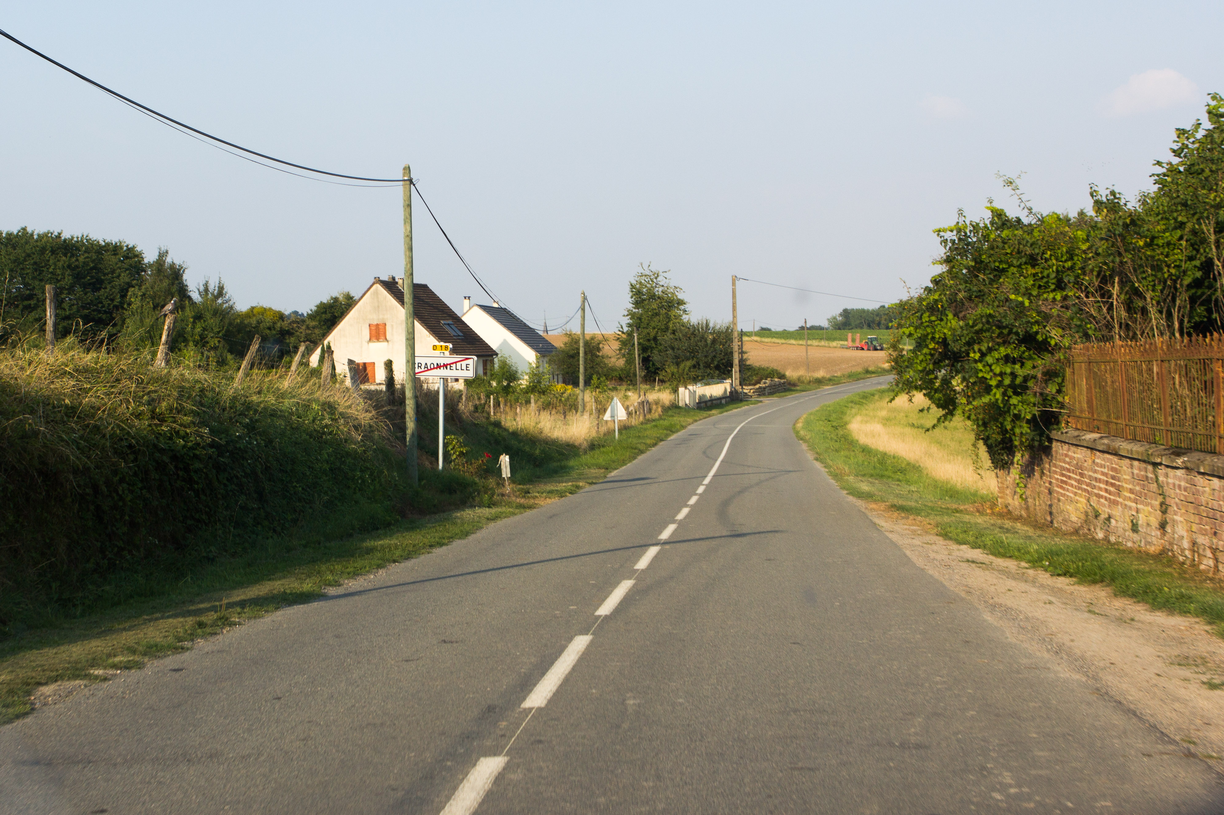 Sortie est de Craonnelle, RD18, en direction de Craonne / Craonnelle, Aisne, France